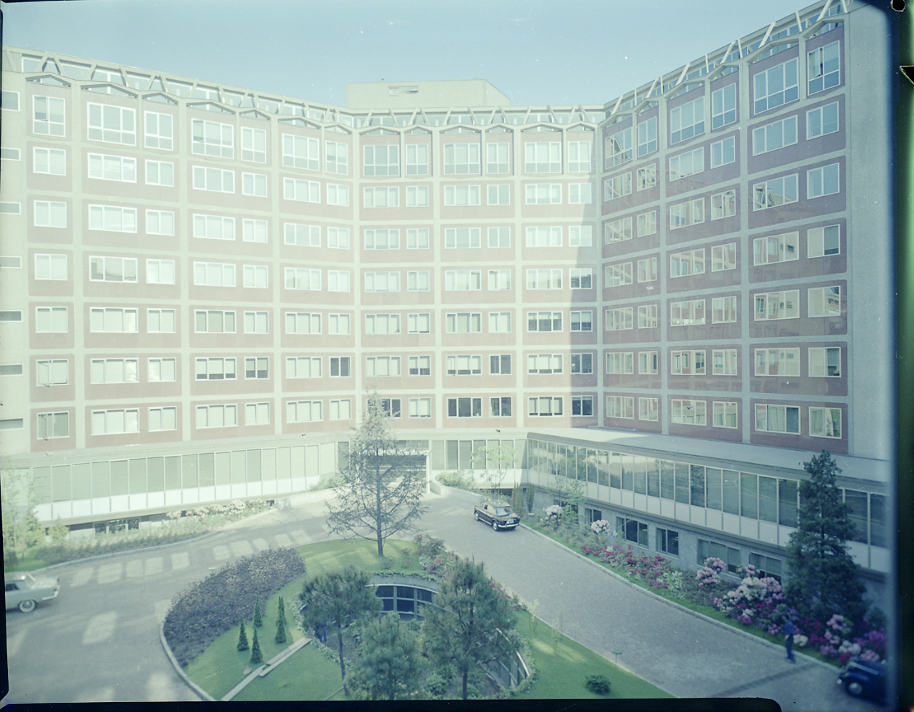 Servizio fotografico : Milano, 1962 / Paolo Monti. - Buste: 4, Fototipi: 4 : Negativo colore, sviluppo cromogeno/ pellicola ; 10x12. - ((Serie costituita da 4 buste sciolte di negativi colore identificati con una doppia numerazione (da 5205 a 5208 [cancellata]): 1234, 1235, 1236, 1237. - I negativi presentano segni di degrado (alterazione tonale). - La doppia numerazione potrebbe presumibilmente riferirsi ad una numerazione precedente attribuita al lavoro svolto per Publifoto. - La suddetta serie è contenuta nella scatola GC1175-1272N, formato 18x24, e identificata cin l'iscrizione didascalica manoscritta a pennarello nero: "Colore/ N.". - Nel 1962 la sede della compagnia fu spostata da Via Manzoni 38 a Corso Italia 23 all'angolo con via Santa Sofia. - Occasione: Documentazione del nuovo edificio in Corso Italia 23 e per la pubblicazione: Notarnicola Vittorio (a cura di), "Benvenuti: Riunione Adriatica di Sicurtà", l'assicuratrice italiana, Milano, Amilcare Pizzi, 1962. - Fonte: Rubrica di Paolo Monti: Archivio fino 1-4-1961/ 31-3-1963 (1961-1963), presso Archivio Paolo Monti. - Fonte: Monografia di Notarnicola, Vittorio (a cura di): Benvenuti: Riunione Adriatica di Sicurtà, l'assicuratrice taliana, Milano, Amilcare Pizzi (1962/05/09). Grafica di Albe Steiner